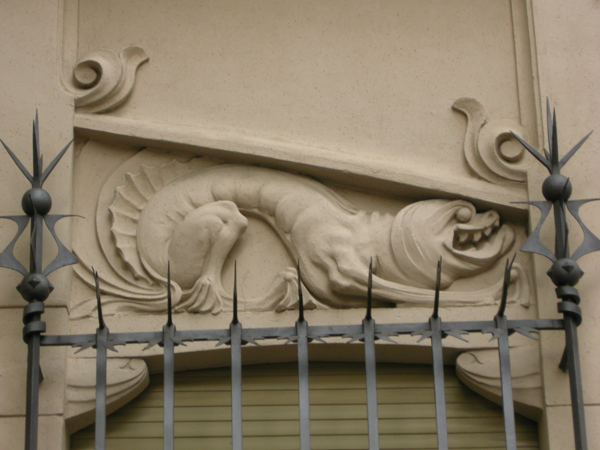 Villino lampredi n.9